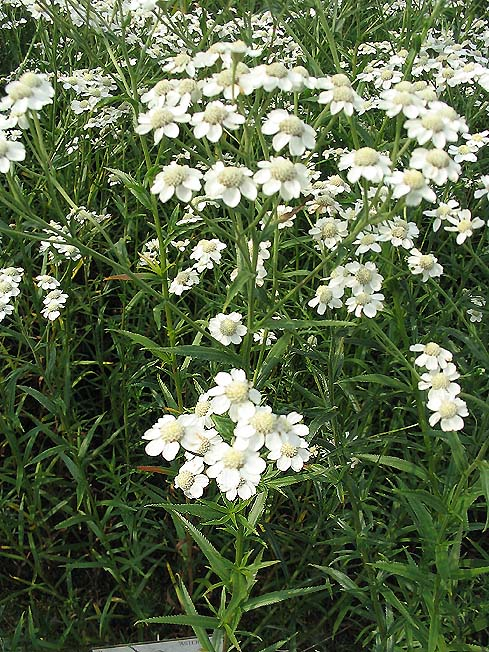 Achillea ptarmica (achillée sternutatoire) Photo prise au parc botanique de Meise (Belgique) en août 2004 Jean Tosti 08/2004